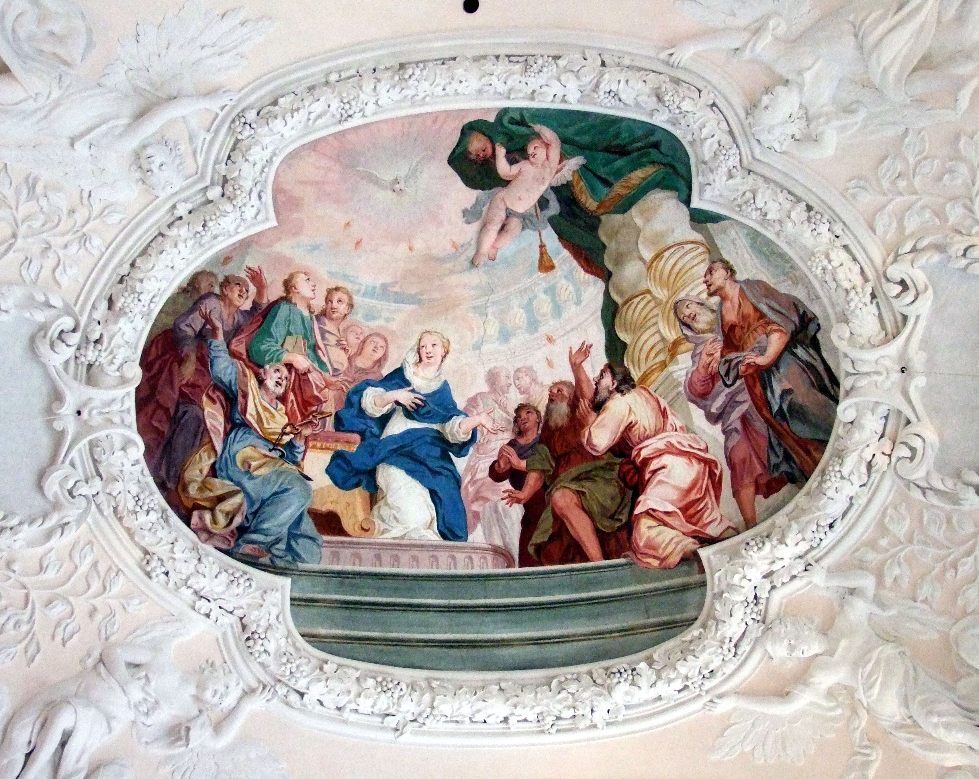 Fresko in der ehemaligen Klosterkirche der Kartause in Buxheim bei Memmingen - OpenStreetMap(Info)